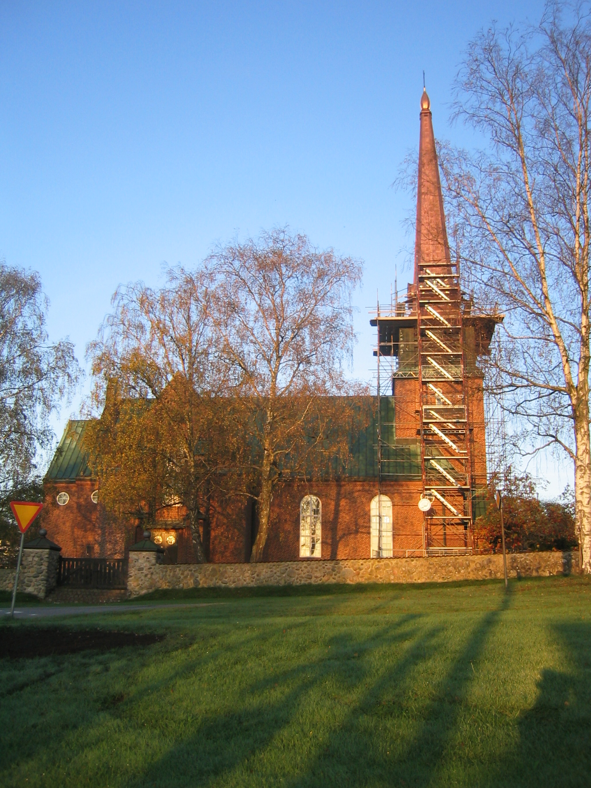 Hösten 2006 efter takrenoveringen.